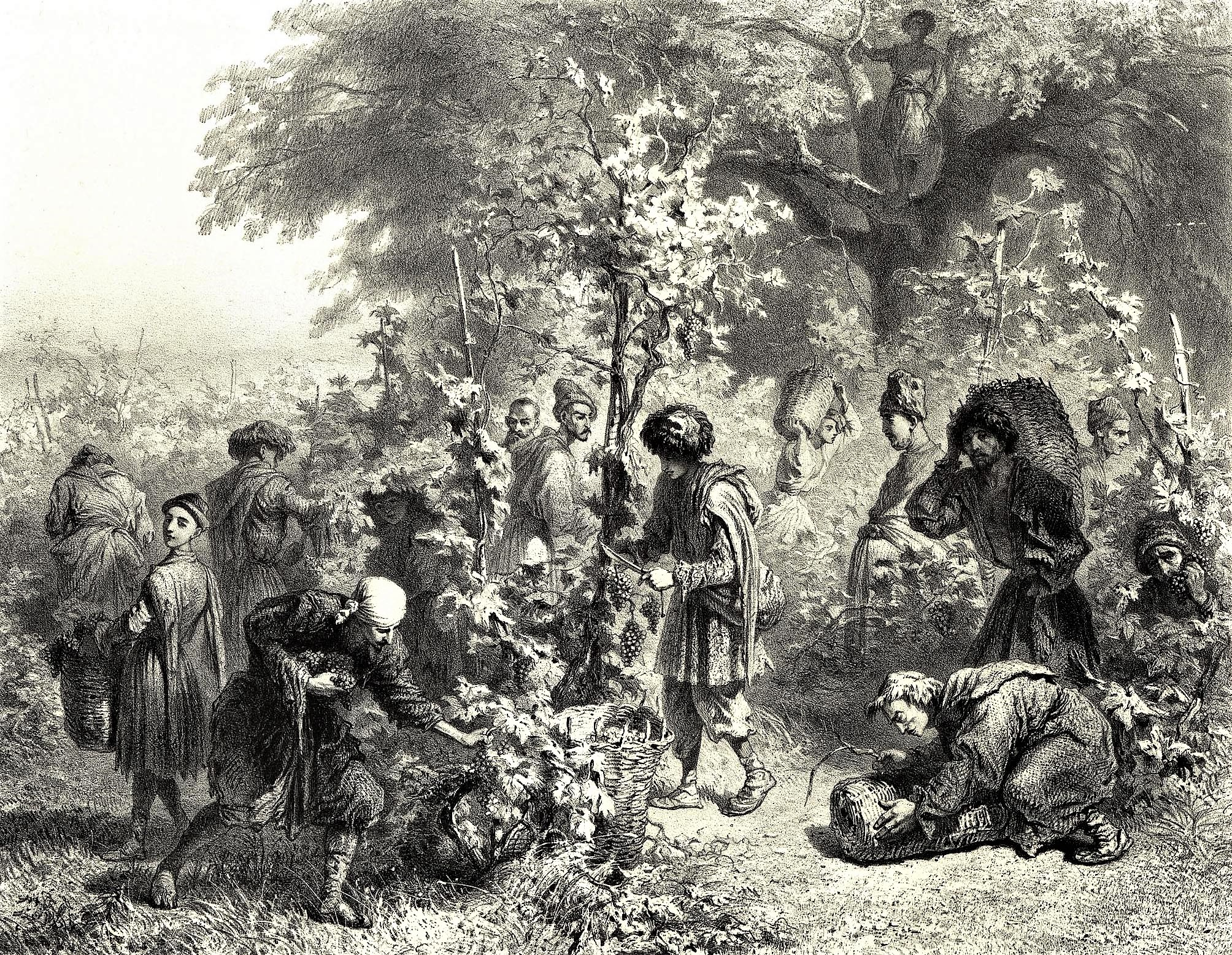 Georgie. Vendanges en Kakhetie.